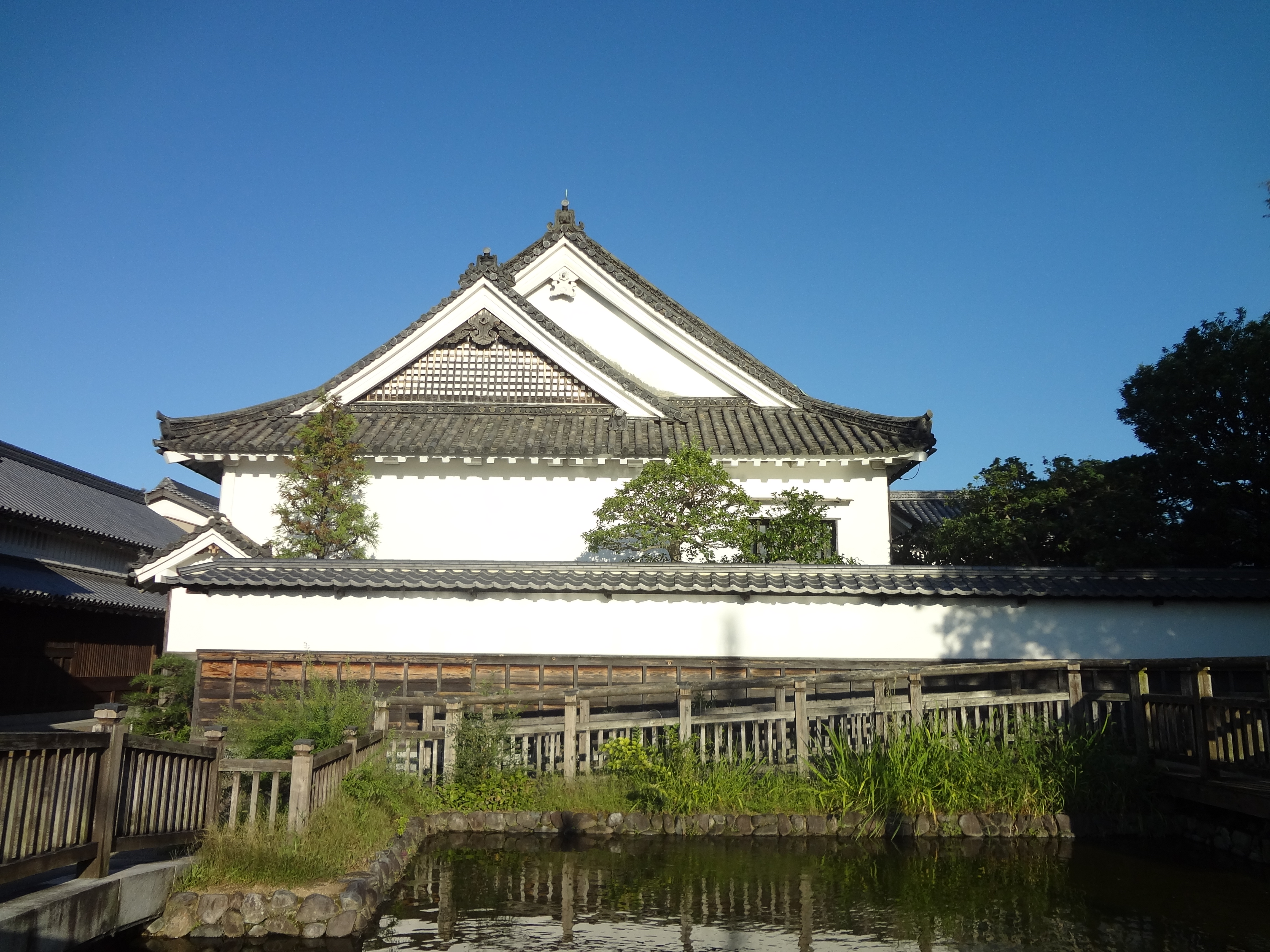 惣年寄筆頭